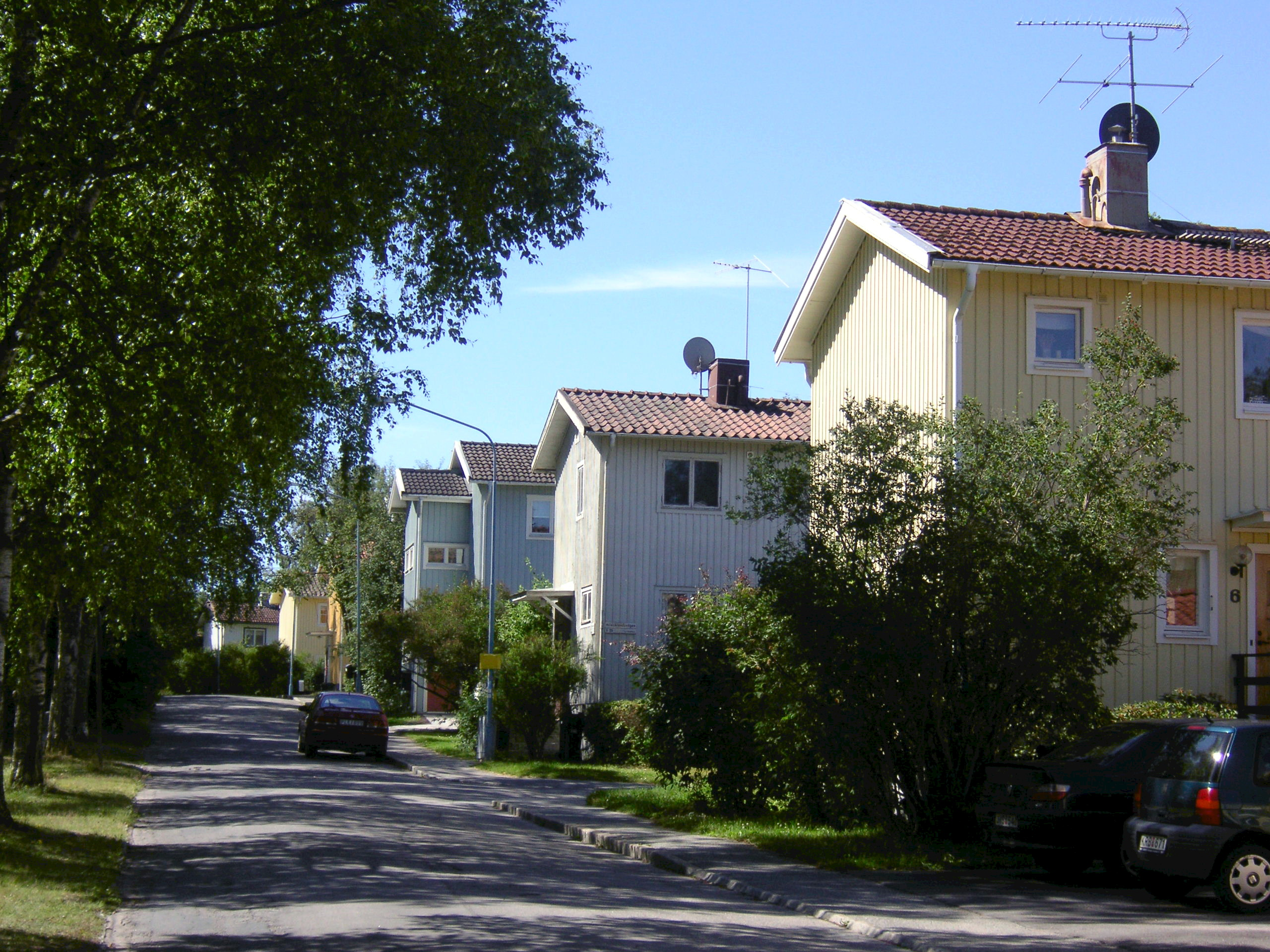 Norra Ängby, Bromma/Stockholm